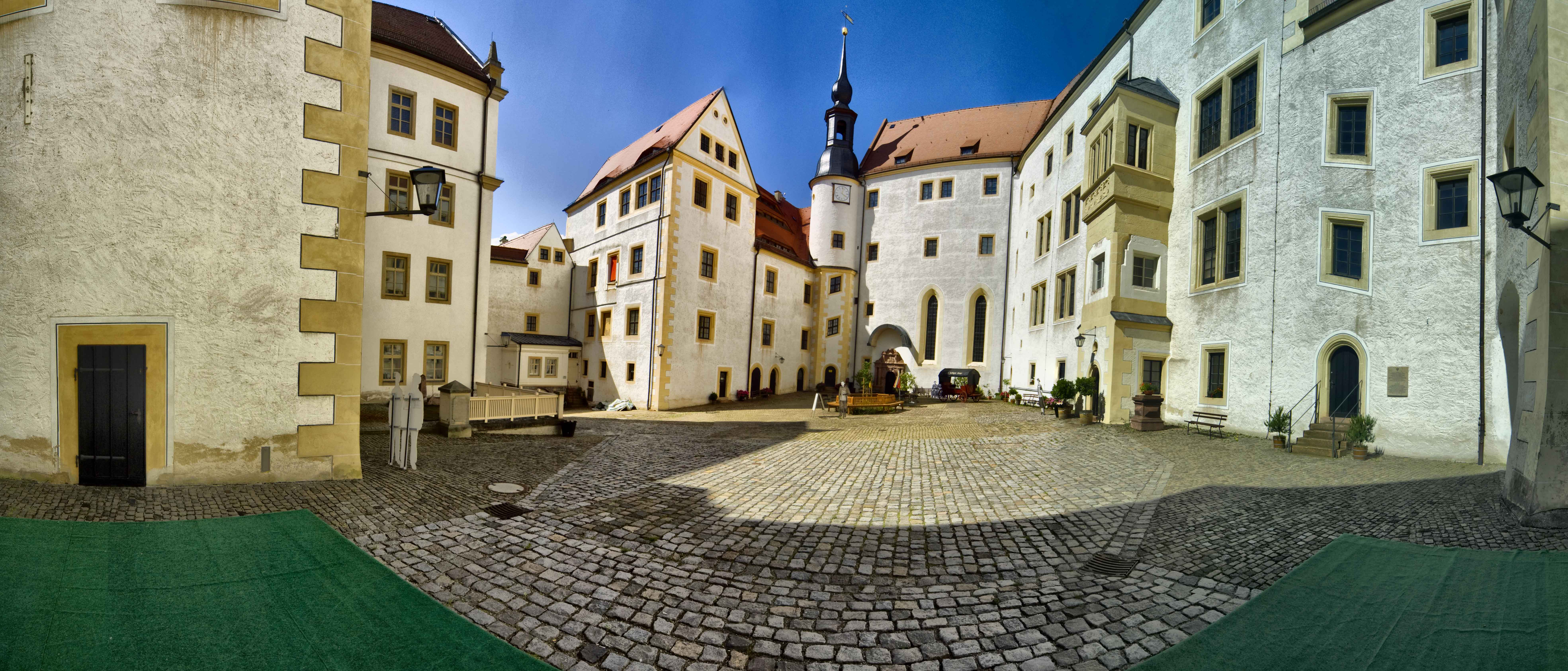 Schloss Colditz - Hinterschloss - Ältester Teil im Juli 2011